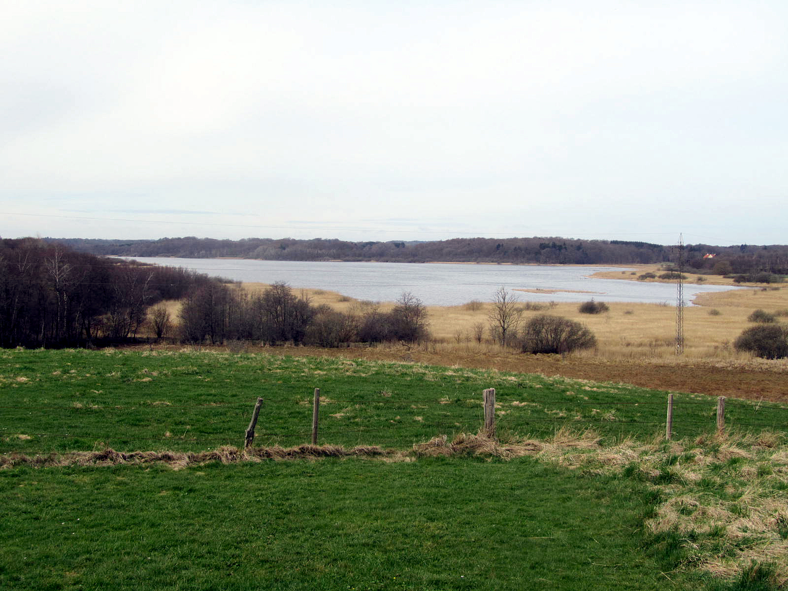 Rands Fjord set fra fra sydøst, fra Egeskov Kirke